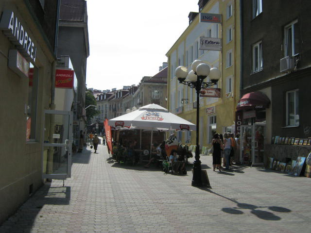 Białystok - deptak na Spółdzielczej